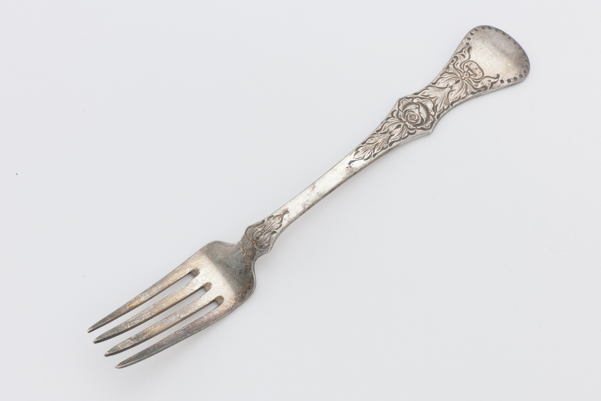 Dessertgaffel i nysølv. Foto: Berg, Roger / Kommandør Chr. Christensens Hvalfangstmuseum, SA.02205.